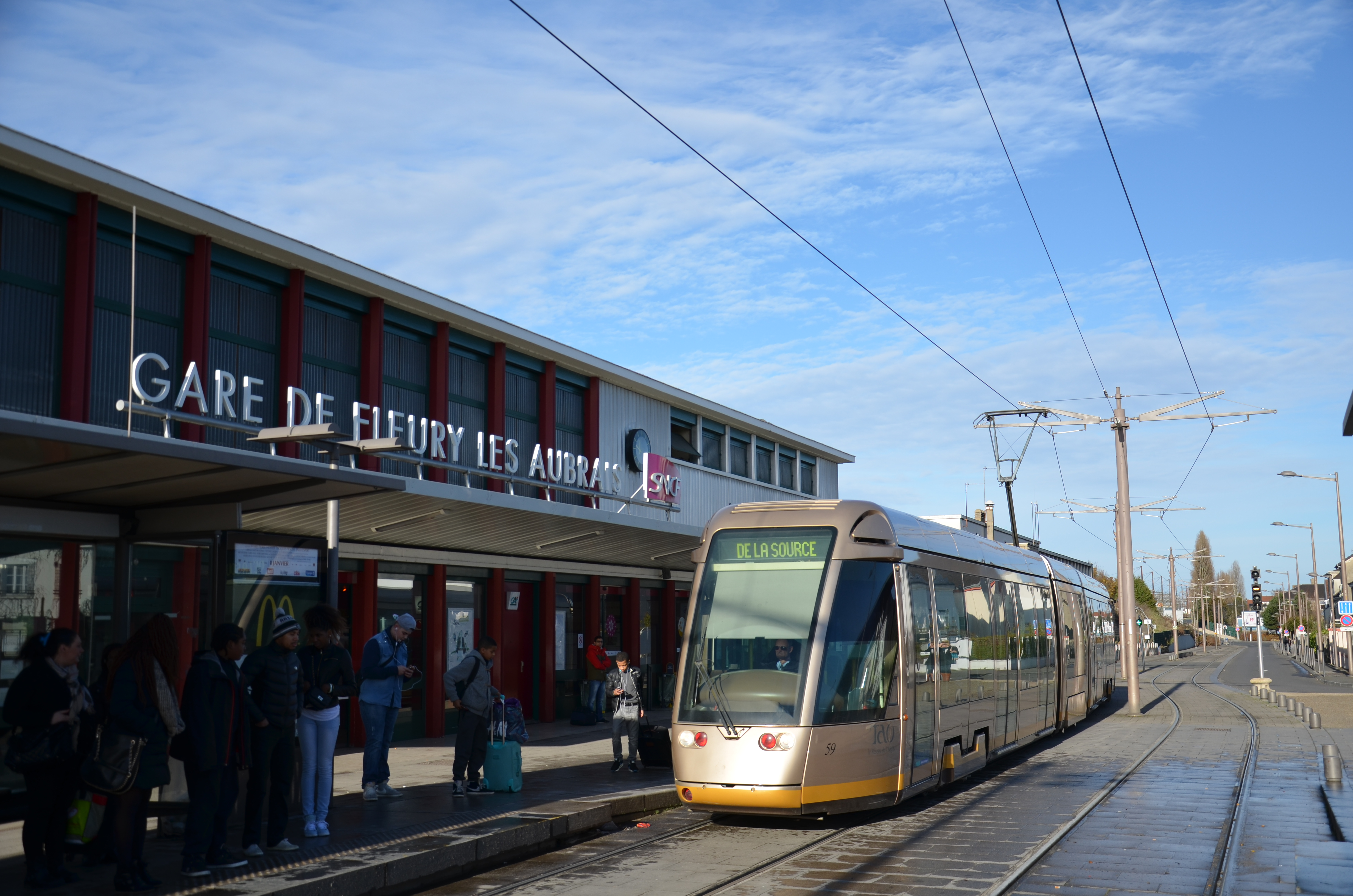 La rame Alstom Citadis 301 n°59 du réseau TAO d'Orléans arrive à la station Gare des Aubrais sur la ligne A, en direction d'Orléans La Source.